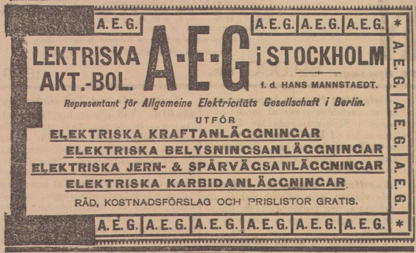 Elektriska AB AEG - annons från 1899